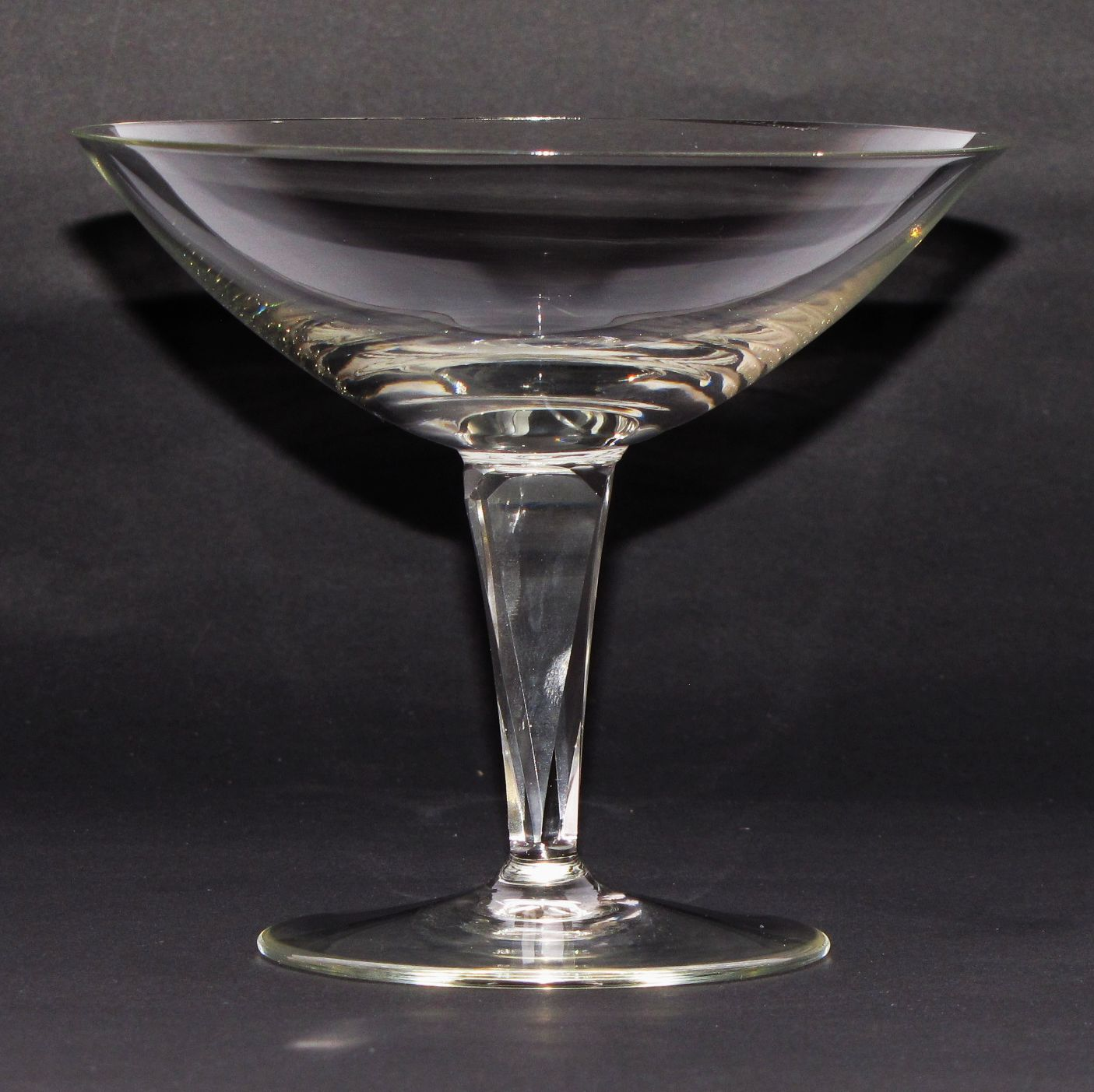 Sektschale Glasservice "Lobenstein" champagne cup glass service "Lobenstein"